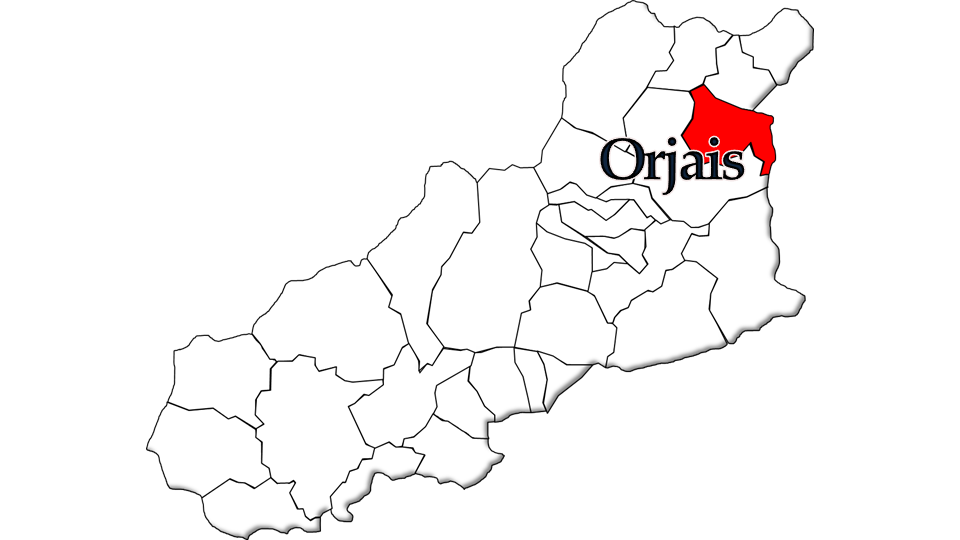 População